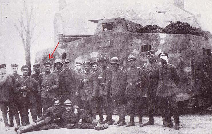 Leutnant Ernst Volckheim (Pfeil) im Jahre 1918 mit seiner Panzerbesatzung 506 "Alter Fritz"